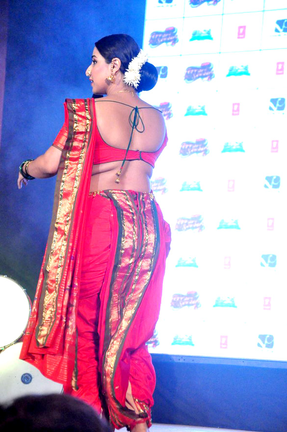 Vidya Balan performs Lavani to promote 'Ferrari Ki Sawaari'